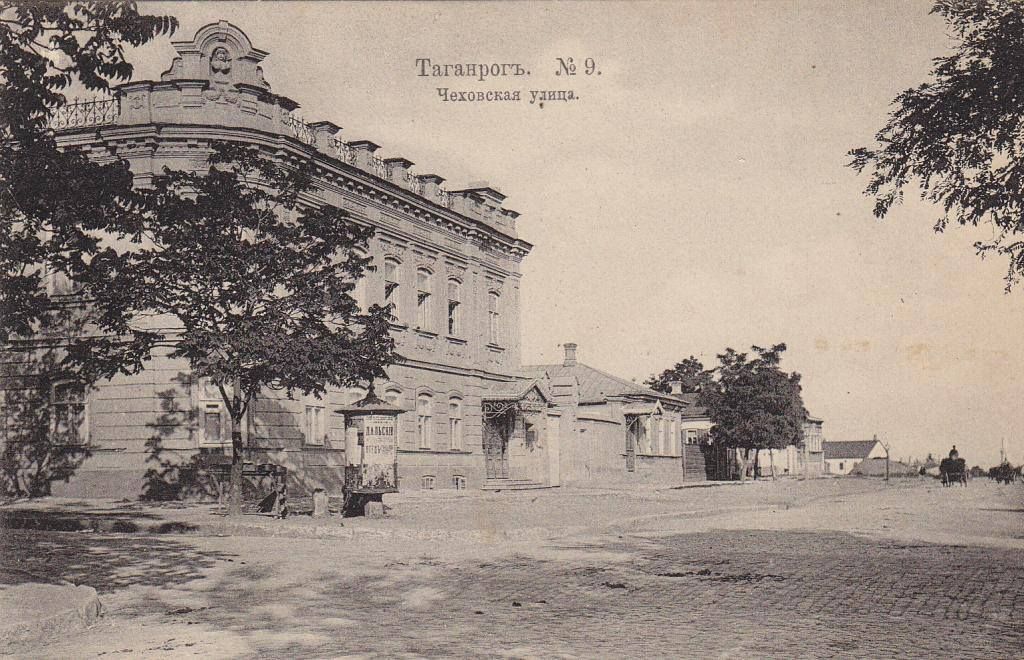 Чеховская улица, Таганрог Ростовская область РФ